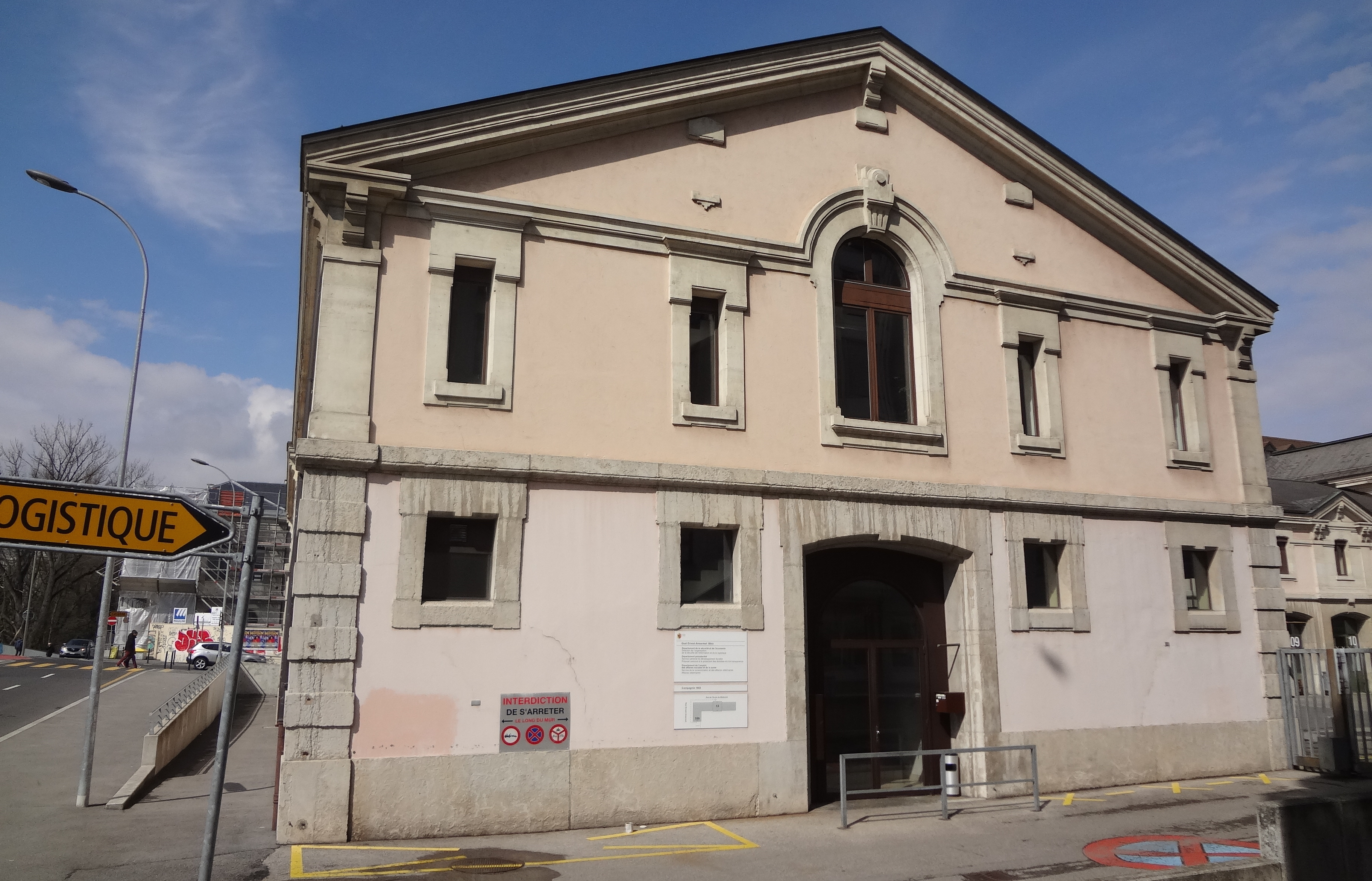 Arsenal de Plainpalais. Bâtiment de style néo-classique, classé, construit en 1875-1876 par John Camoletti. Façade latérale côté Arve, quai Ernest-Ansermet.